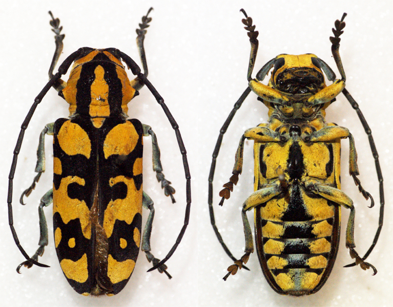 Bertoloni,1845 Sex: Female Data: 08-2013 - Kafue - Zambia Size: ?